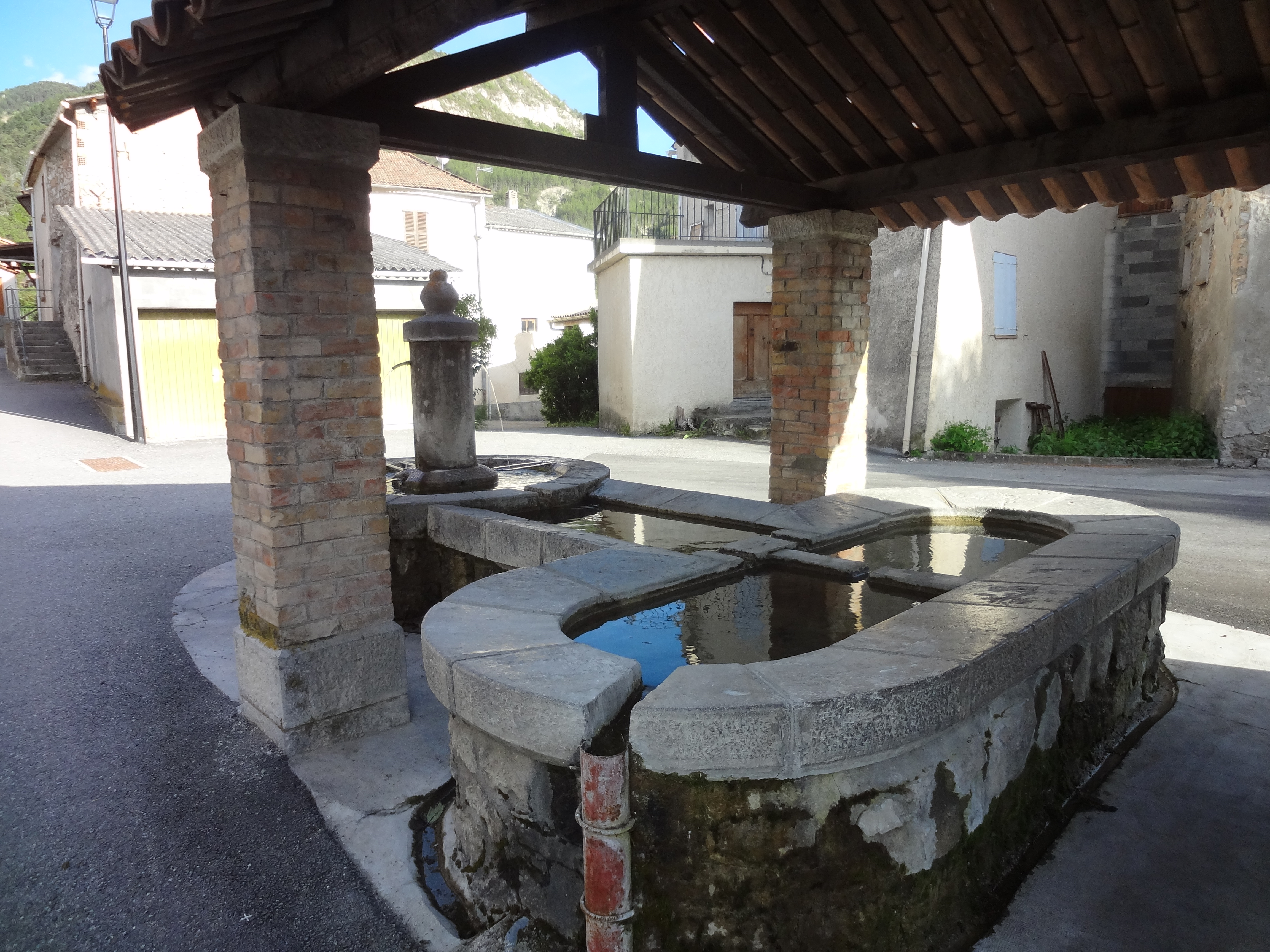 Fontaine lavoir de la place de l'église à Saint-Lions